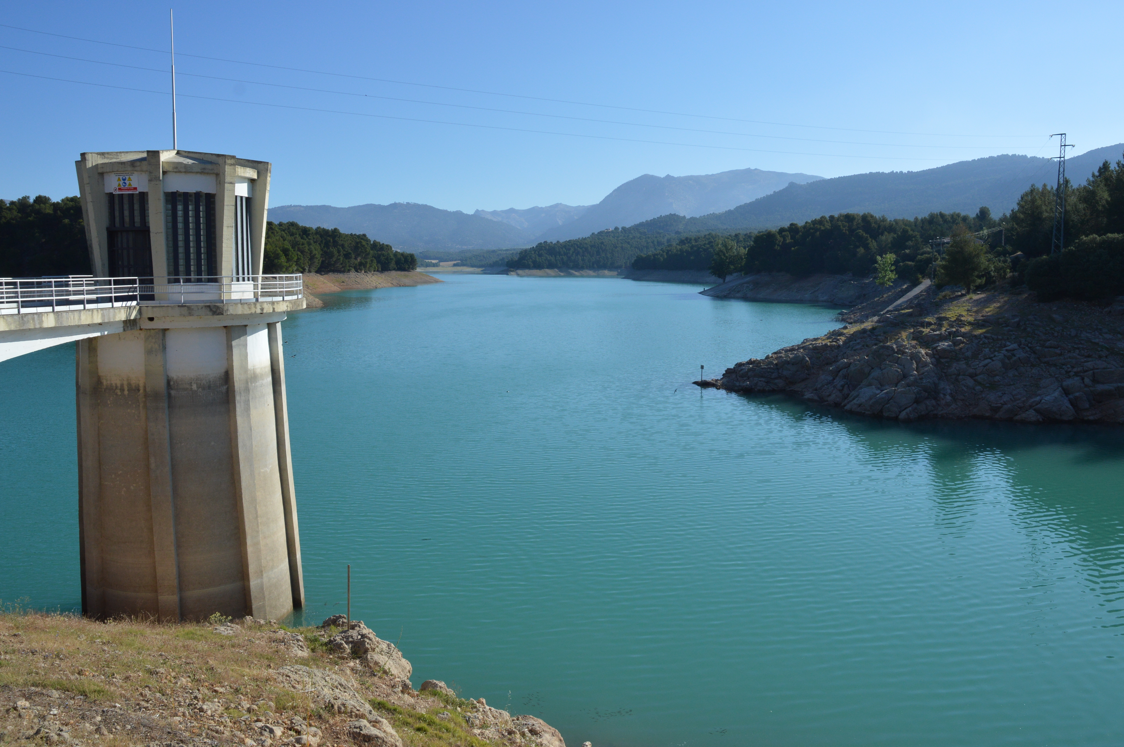 Vista del pantano de la Bolera en Pozo Alcón en Jaén.